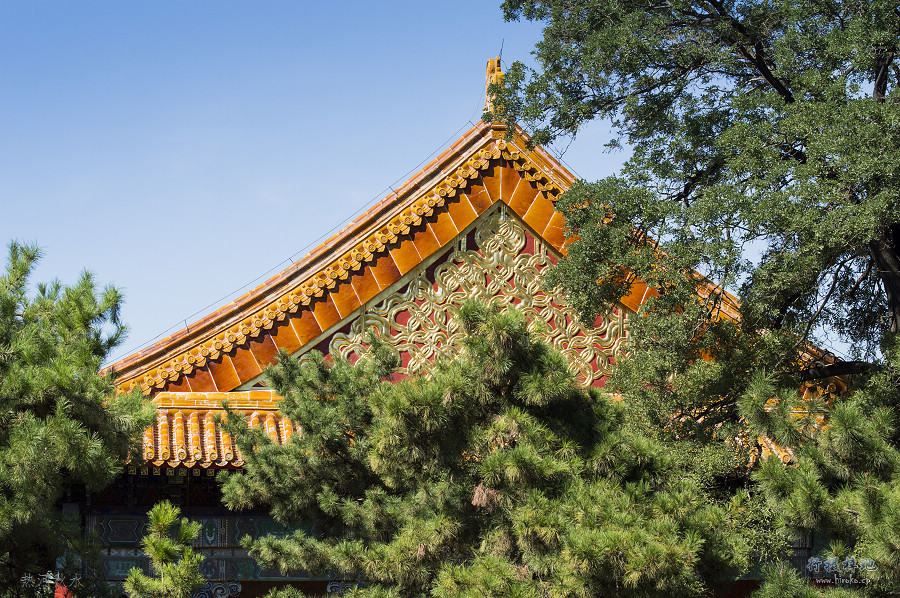 中文（中国大陆）: 汉式“伽蓝七堂”中的大雄宝殿